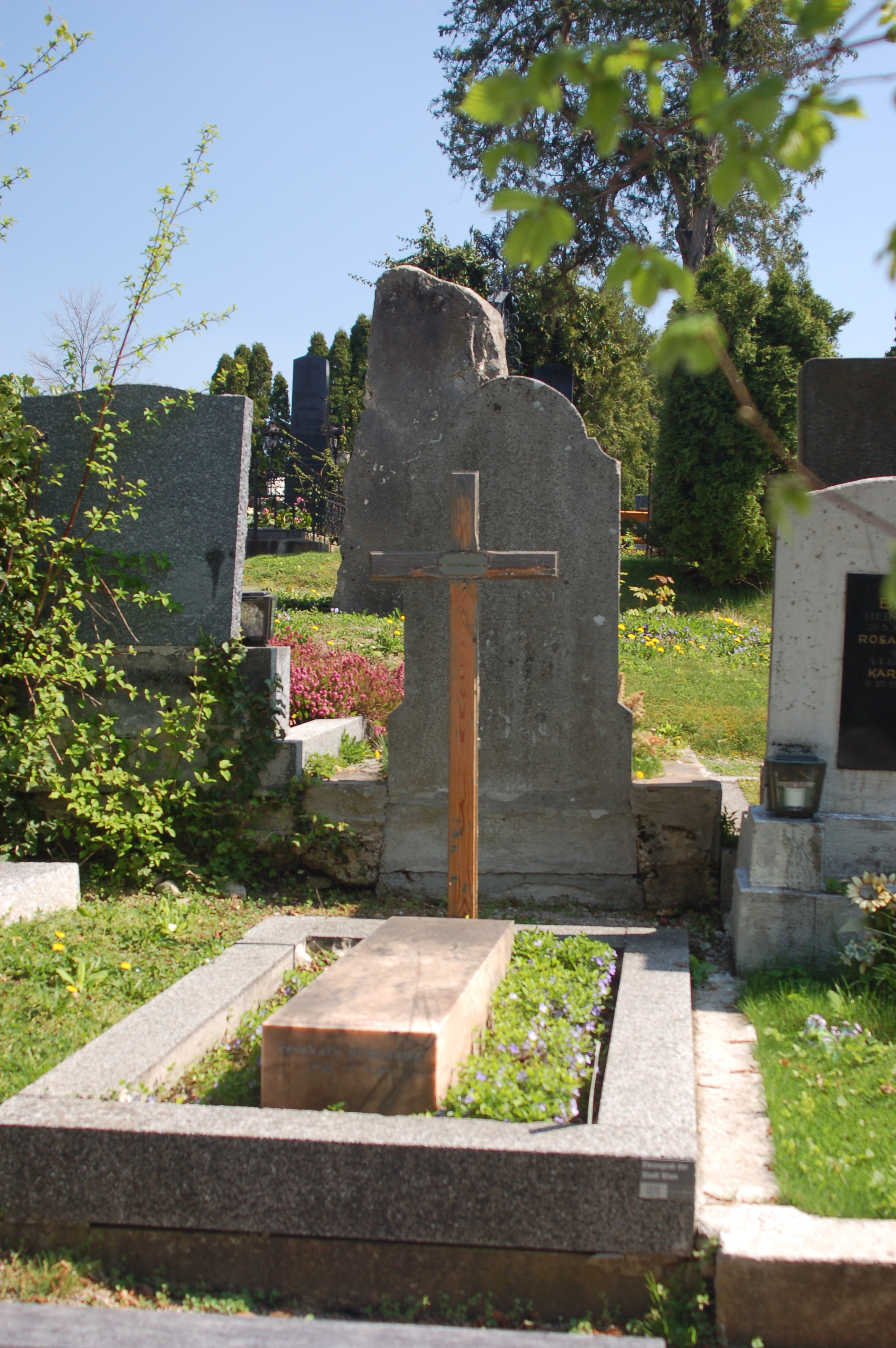 Pötzleinsdorfer Friedhof. Grabmal von Reinhard Priessnitz.